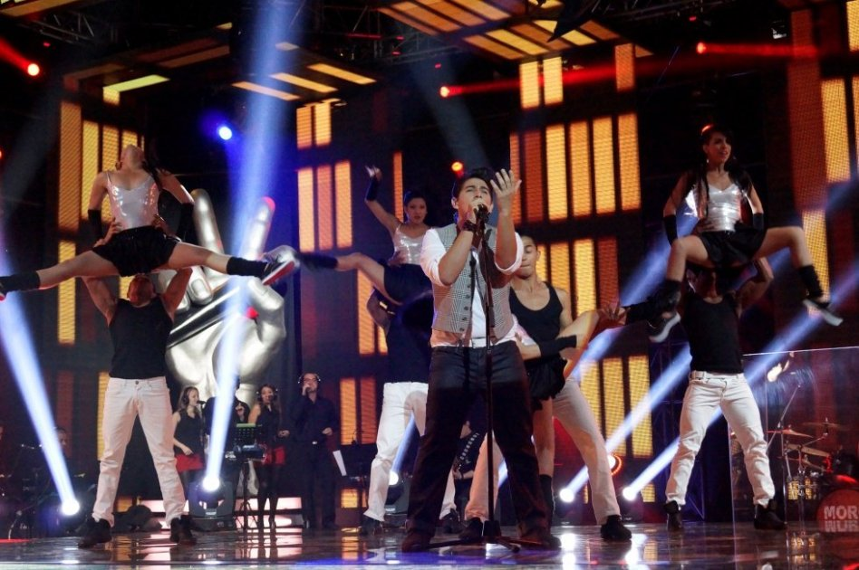 Joan Alarcón en su tercer show en vivo en la voz colombia